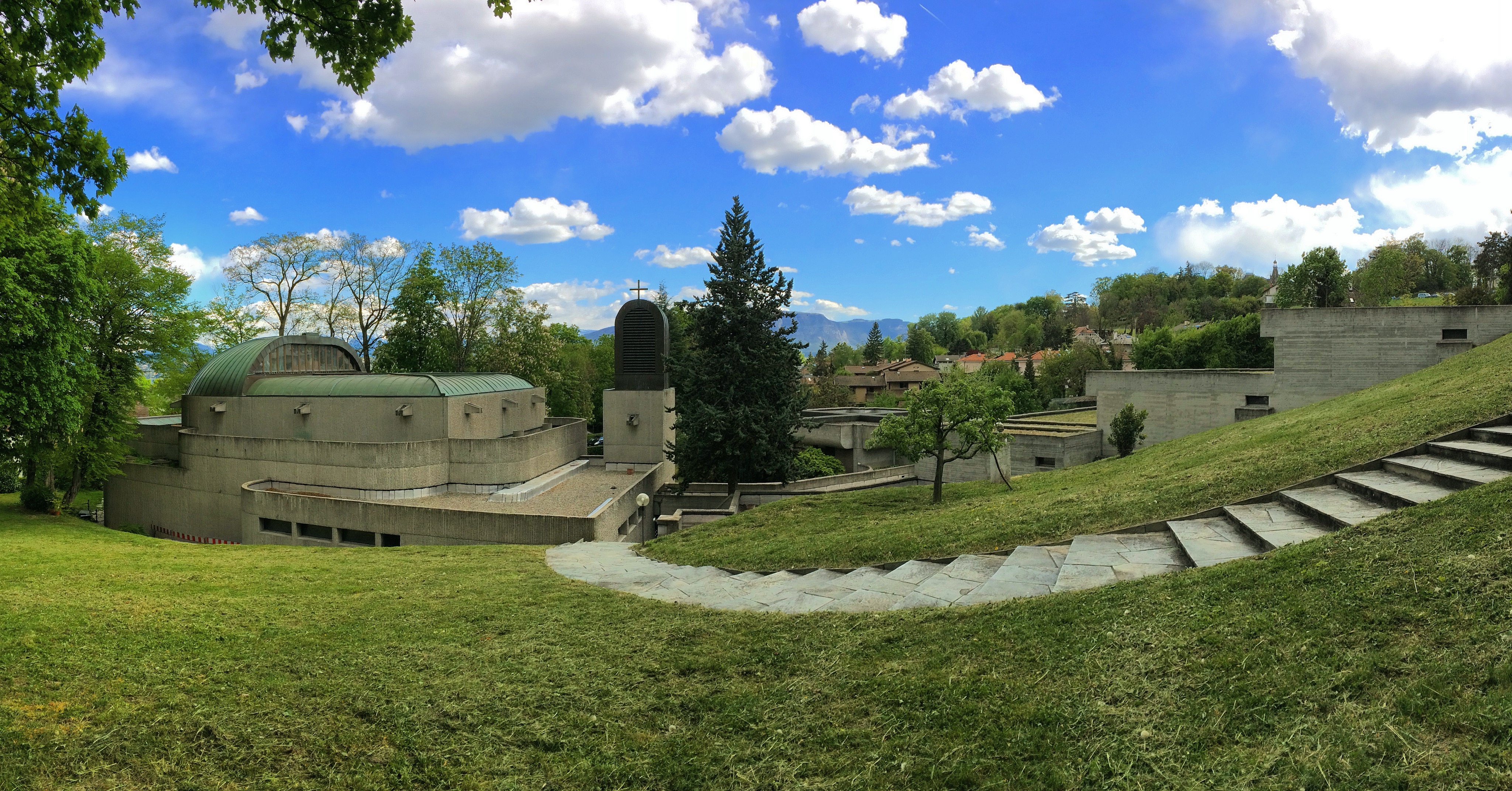 Le Centre orthodoxe du Patriarcat œcuménique de Chambésy est un sanctuaire comprenant une institution stavropégiaque (dépendant directement du patriarche) du Patriarcat œcuménique de Constantinople situé dans la localité de Chambésy-Village du village de Pregny-Chambésy, dans la République et canton de Genève en Suisse.